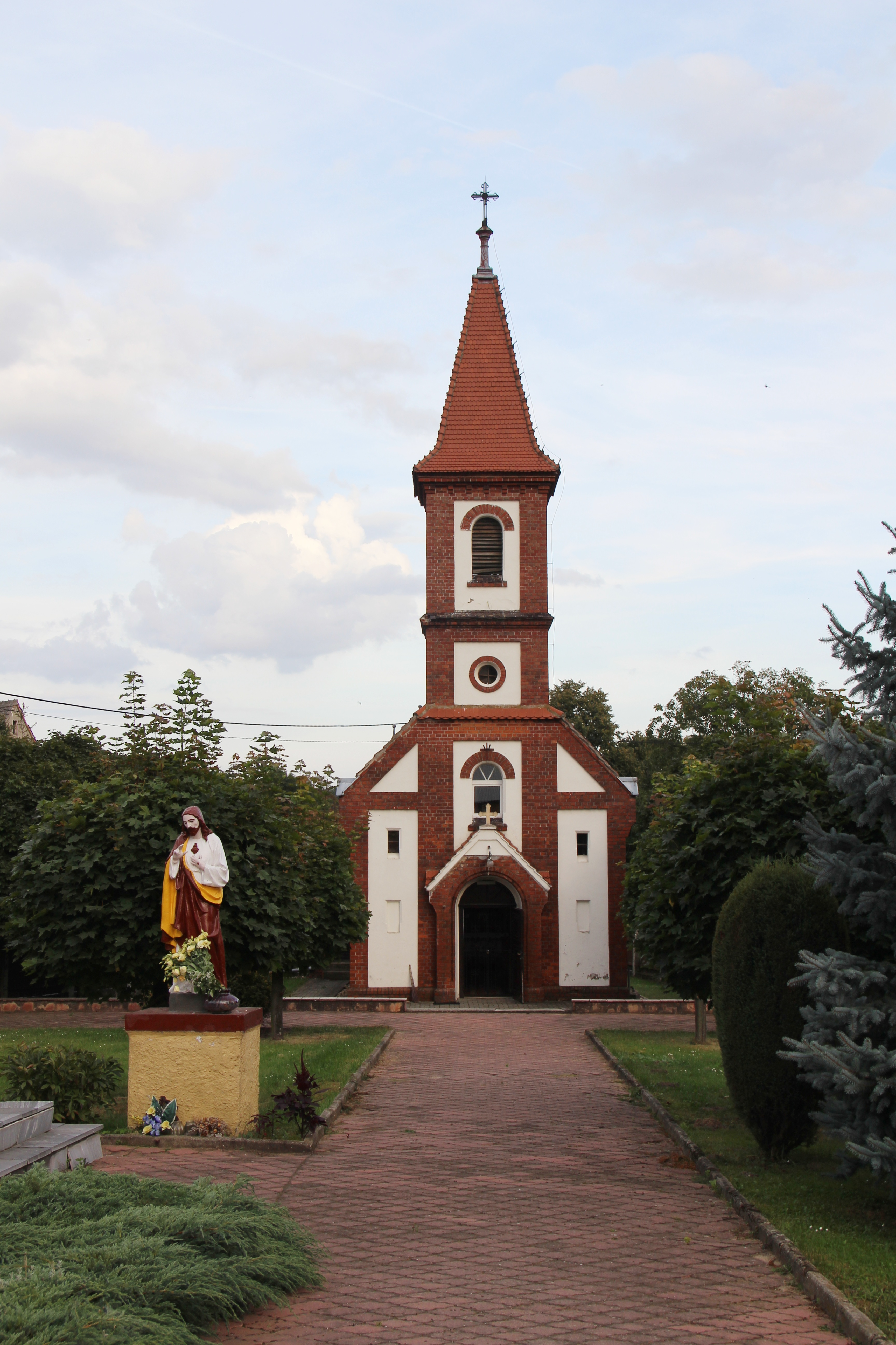 Kłodobok – rzymskokatolicki kościół filialny, obecnie kaplica pw. Najświętszego Serca Pana Jezusa, 1903